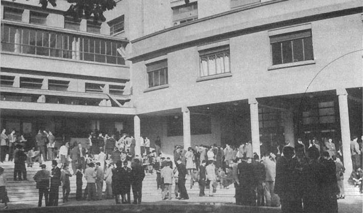 Patio de la Facultad de Derecho de la Universidad de Chile.